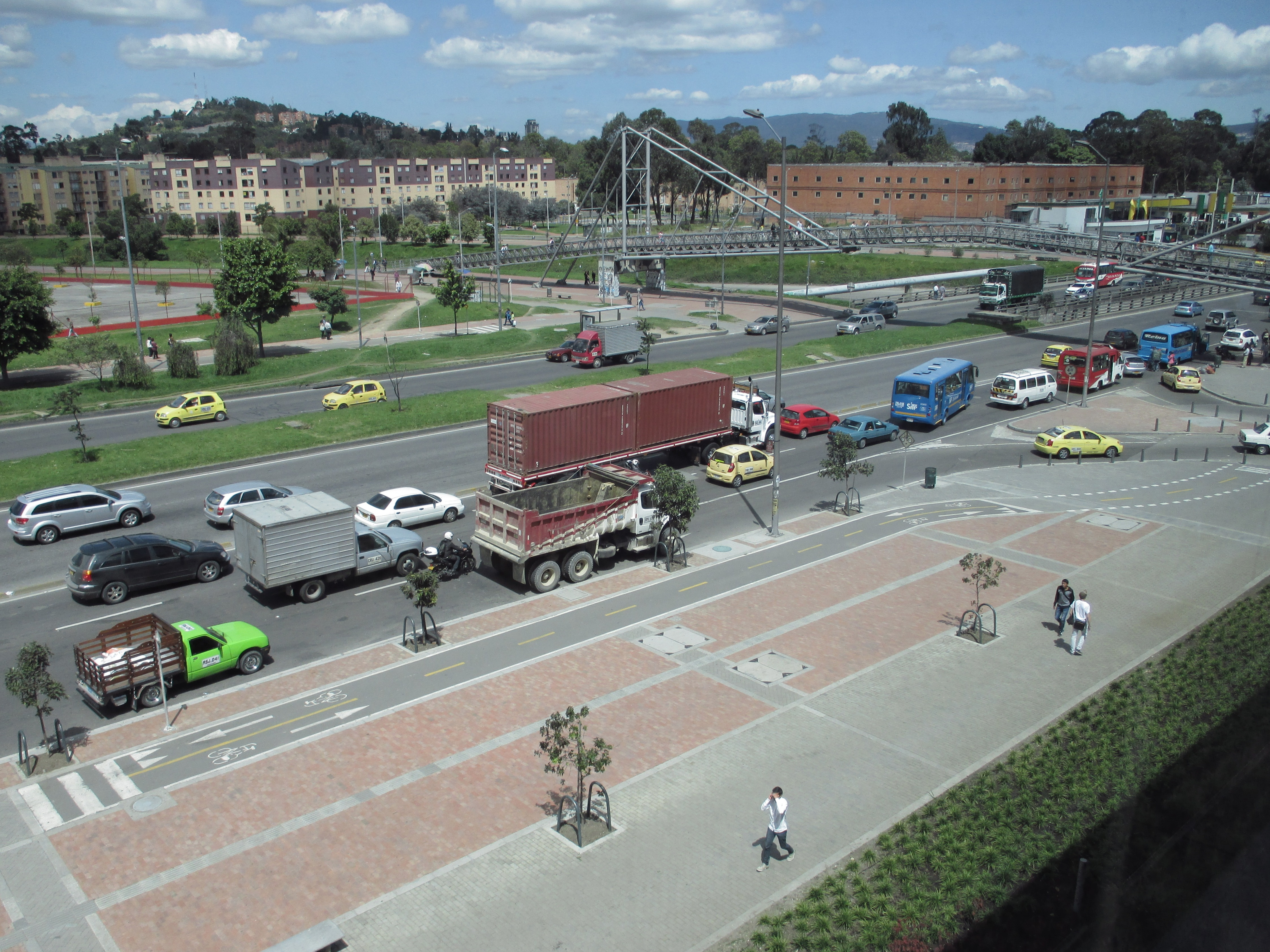 Bogotá